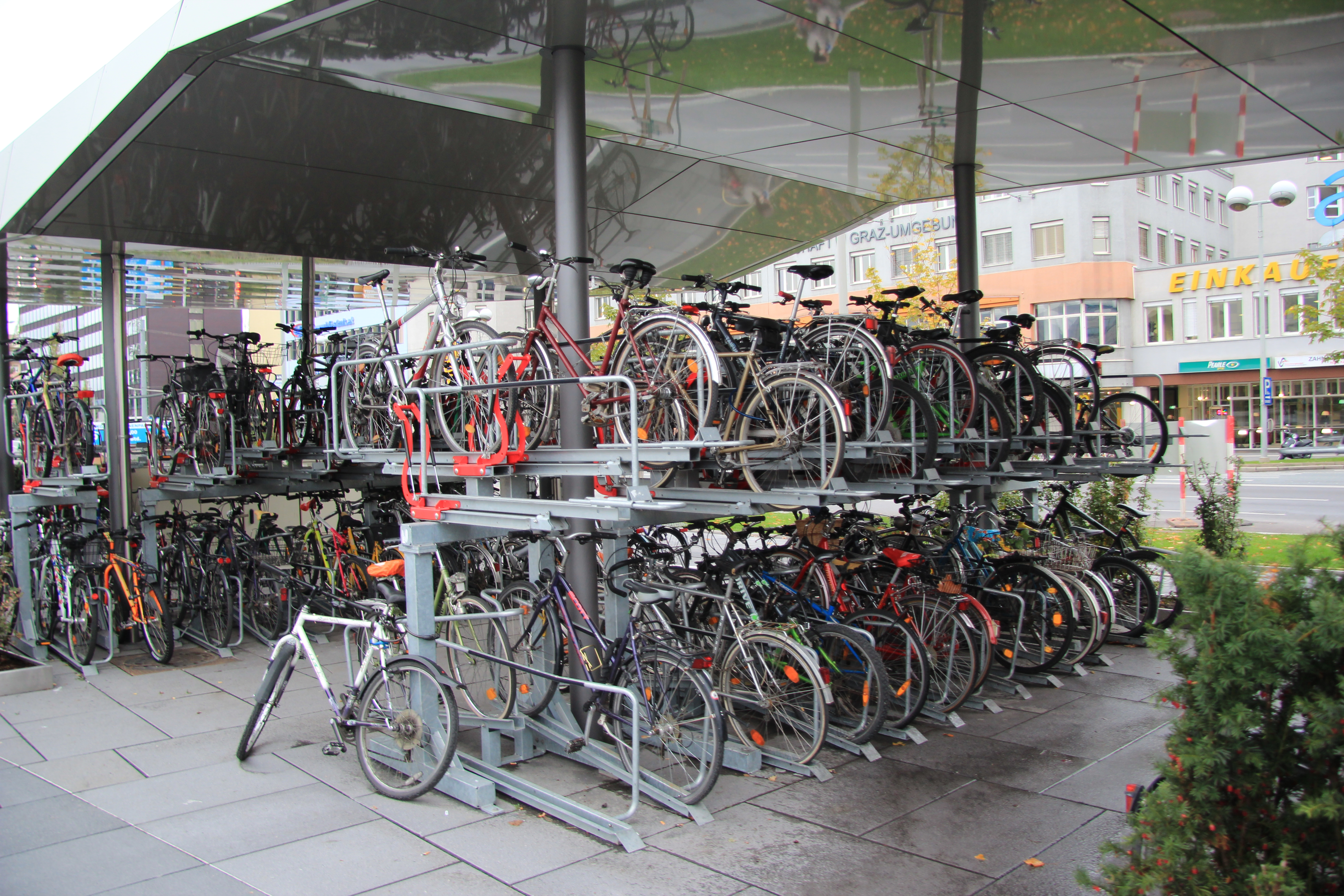 Verschiedene Ansichten amHauptbahnhof Graz